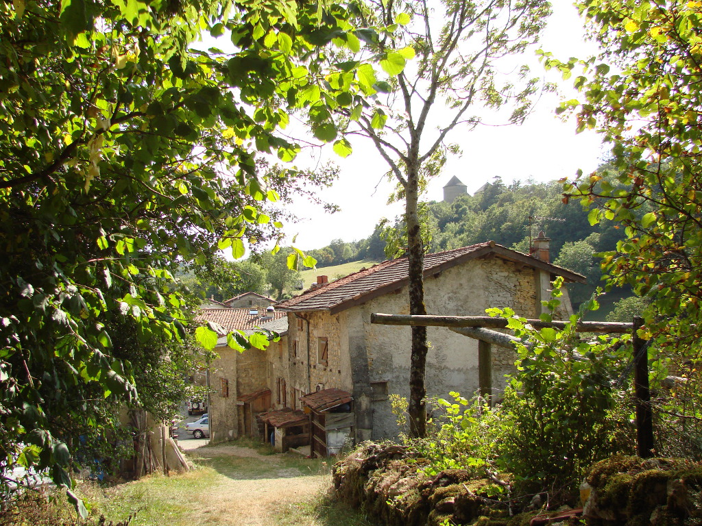 Vue de Bredevent et du château des Allymes (Ambérieu en Bugey)